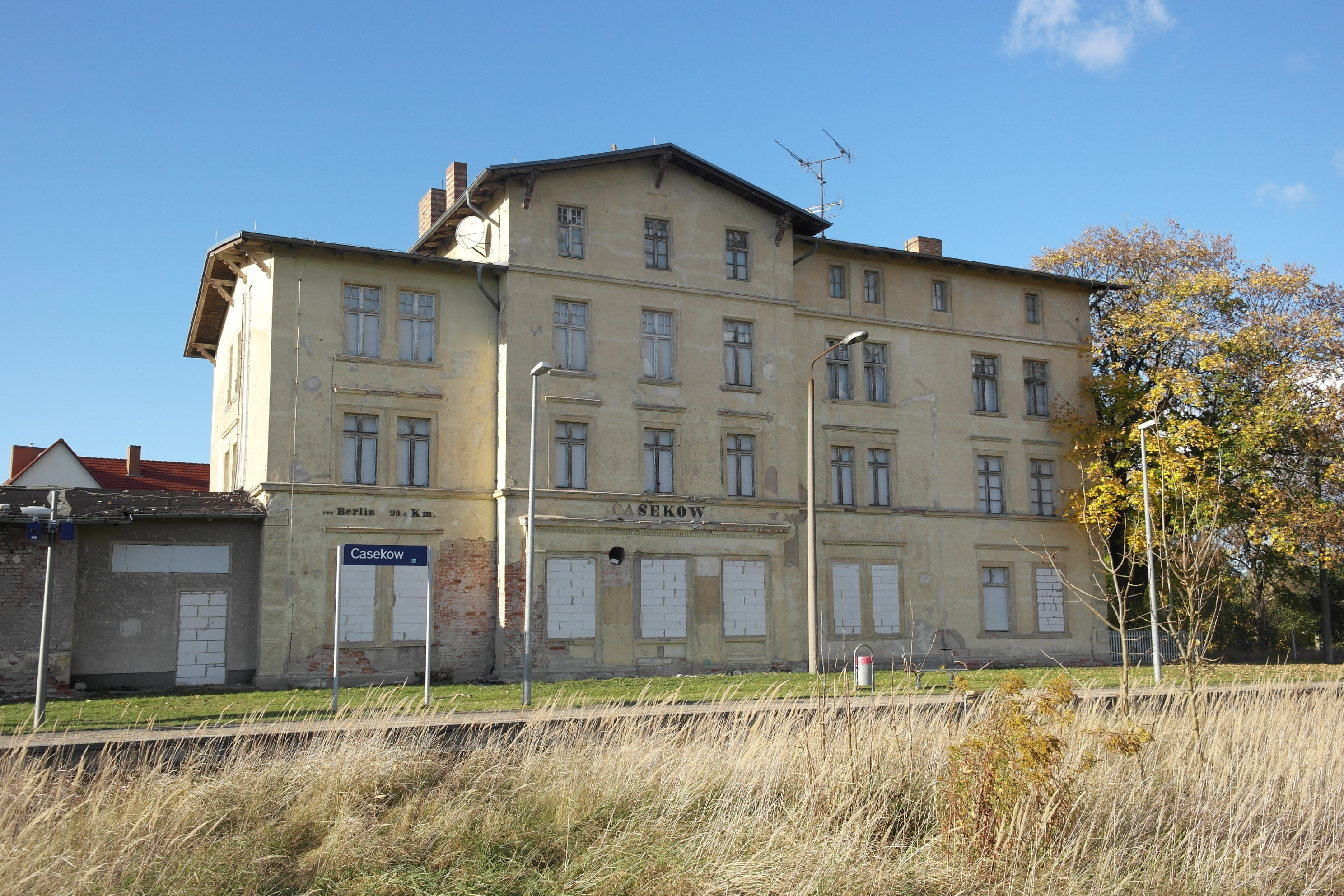 Bahnhof Casekow, denkmalgeschütztes Bahnhofsgebäude, GLeisseite